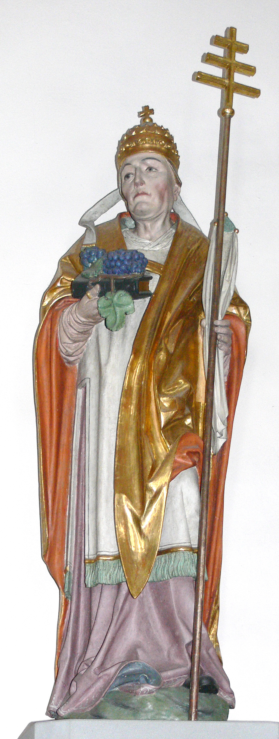 Pfarrkirche St. Christina, Ravensburg: Hl. Urban Zur Autorschaft/Datierung: Nach Alfons Kasper könnte die Figur vor 1500 von Jakob Ruß geschnitzt worden sein; andere Quellen datieren sie ins 16. Jahrhundert. (